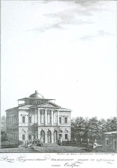 Вид каменного дома с приезда от собора в селе Грузине